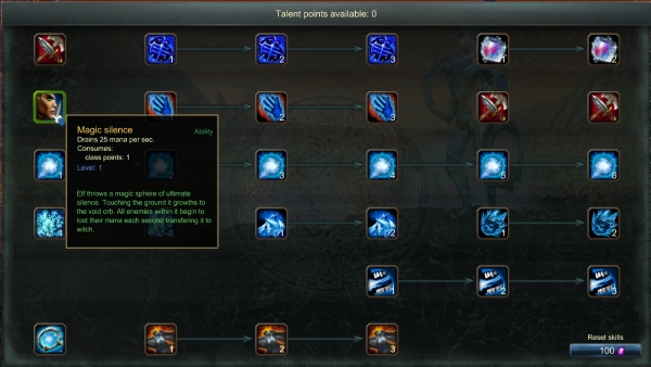 Алтарь Панзара